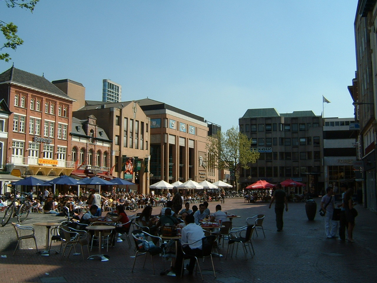 Eigen foto